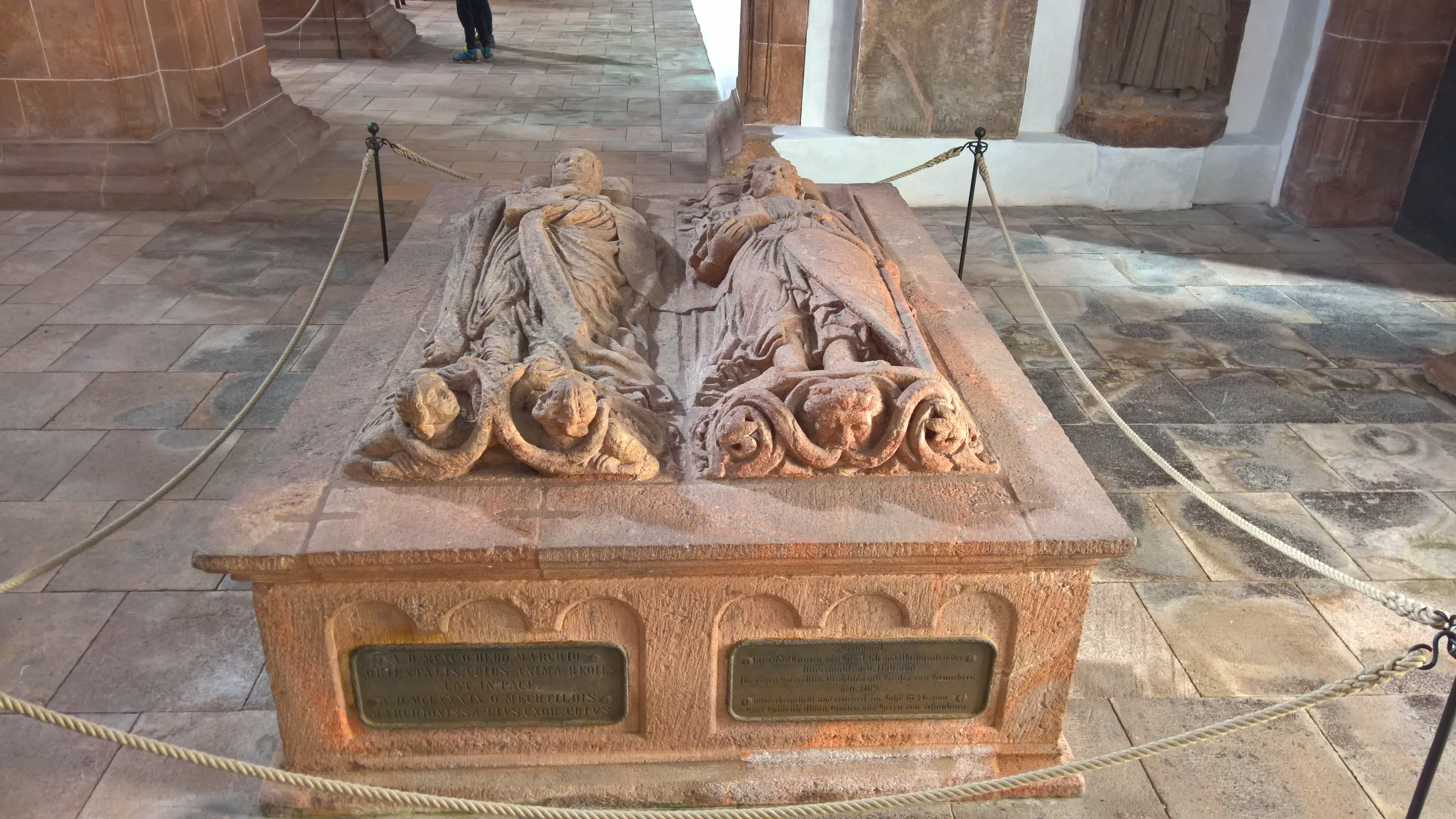 Grablege Groitzsch (Stifter) in der Basilika im Kloster Wechselburg